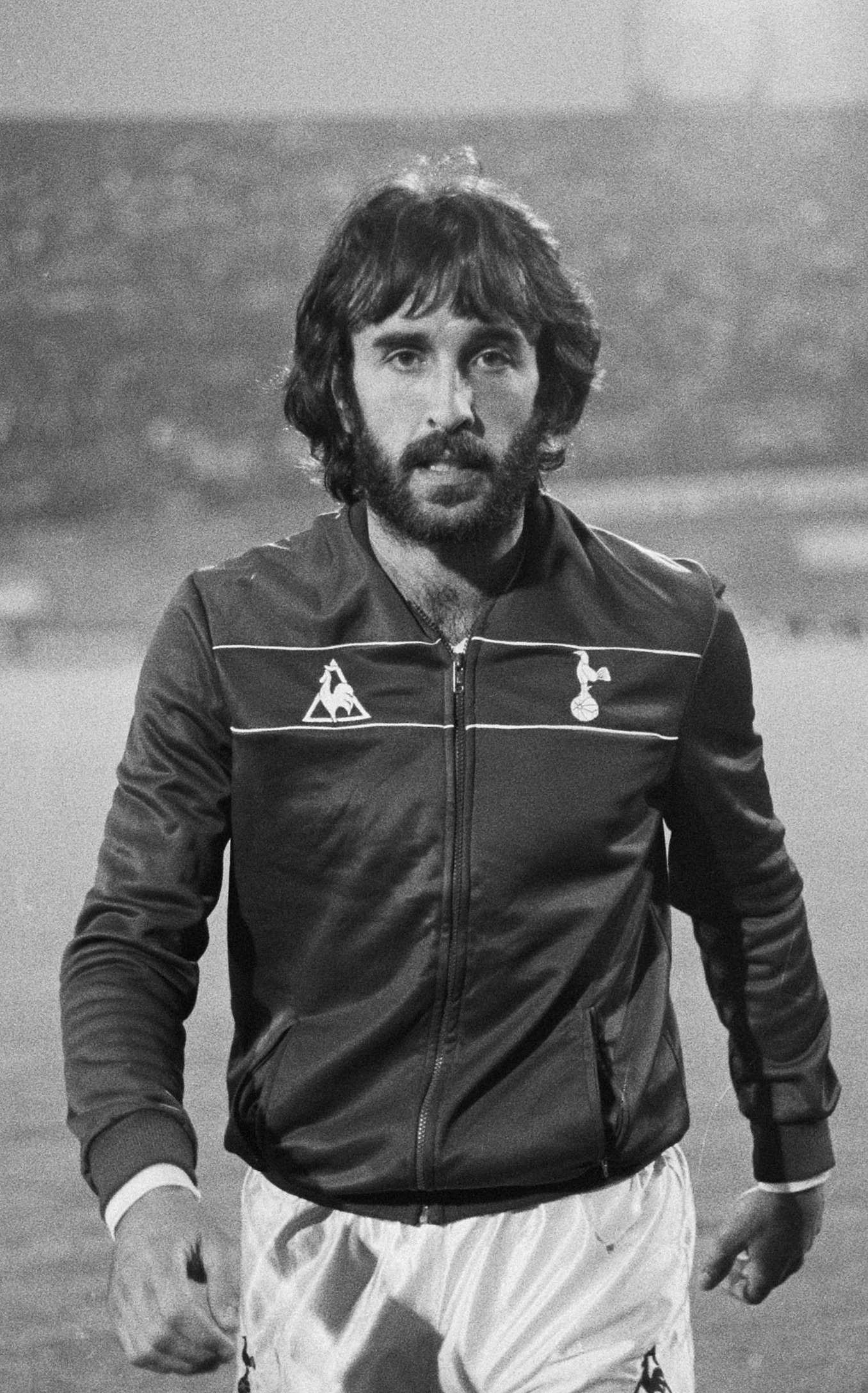 Ricardo Villa, speler Tottenham Hotspur )